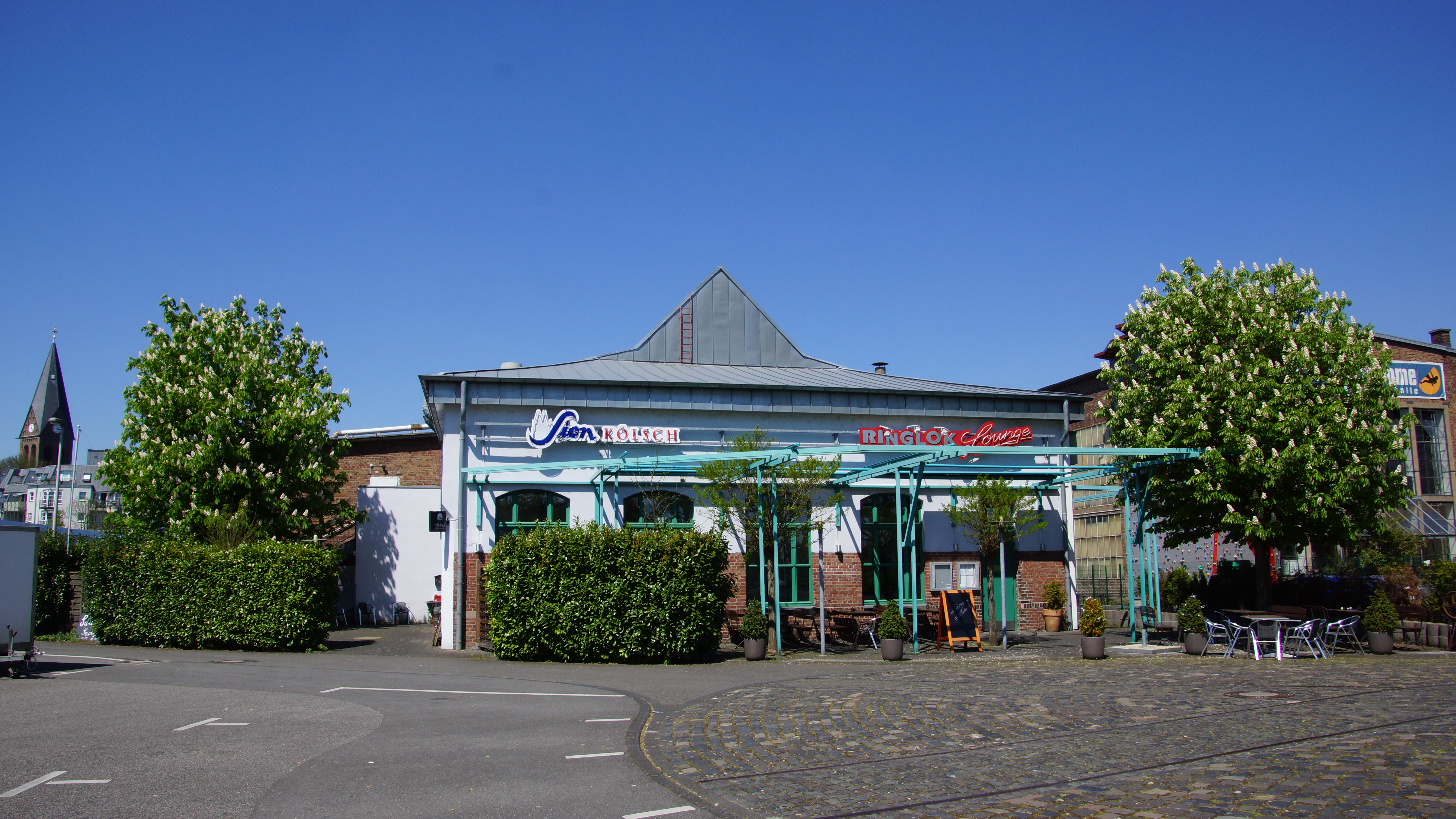 Lokschuppen neben Ringlokanlage in Frechen This is a photograph of an architectural monument. 103